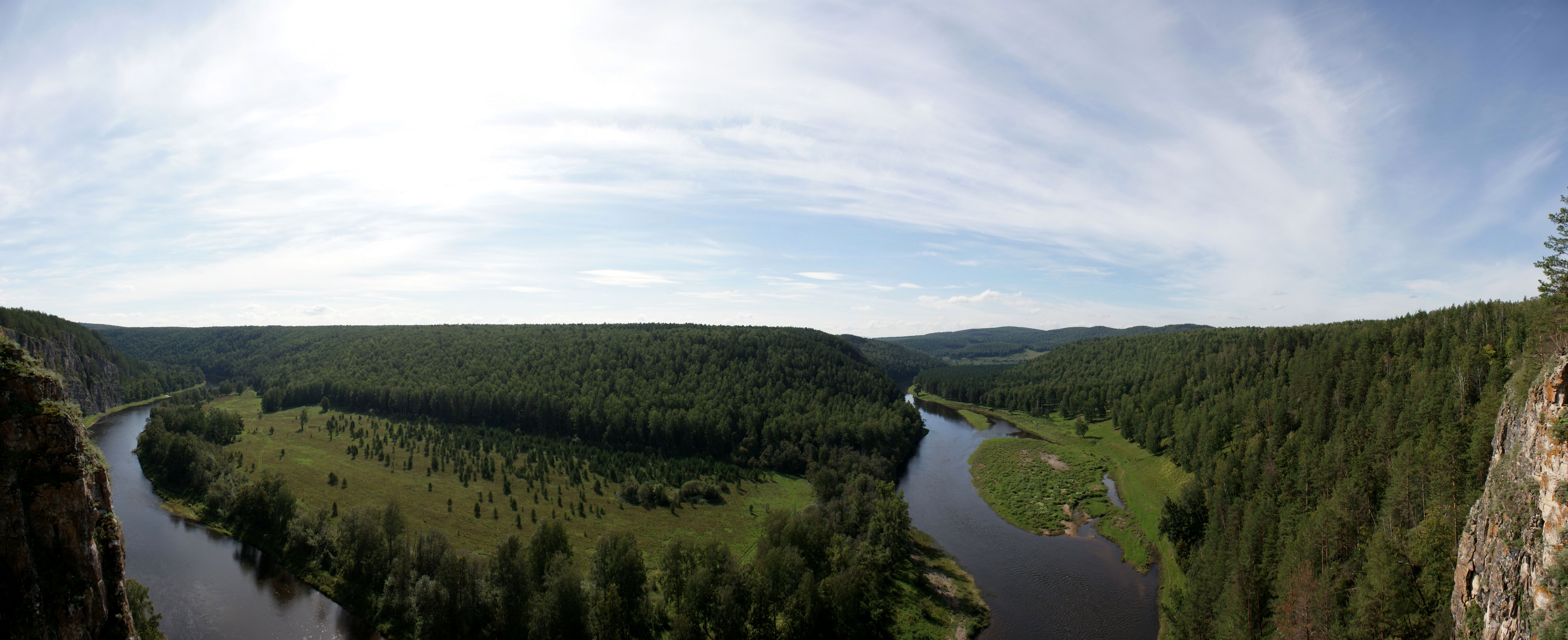 Река Ай (Салаватский р-н, Респ. Башкортостан)